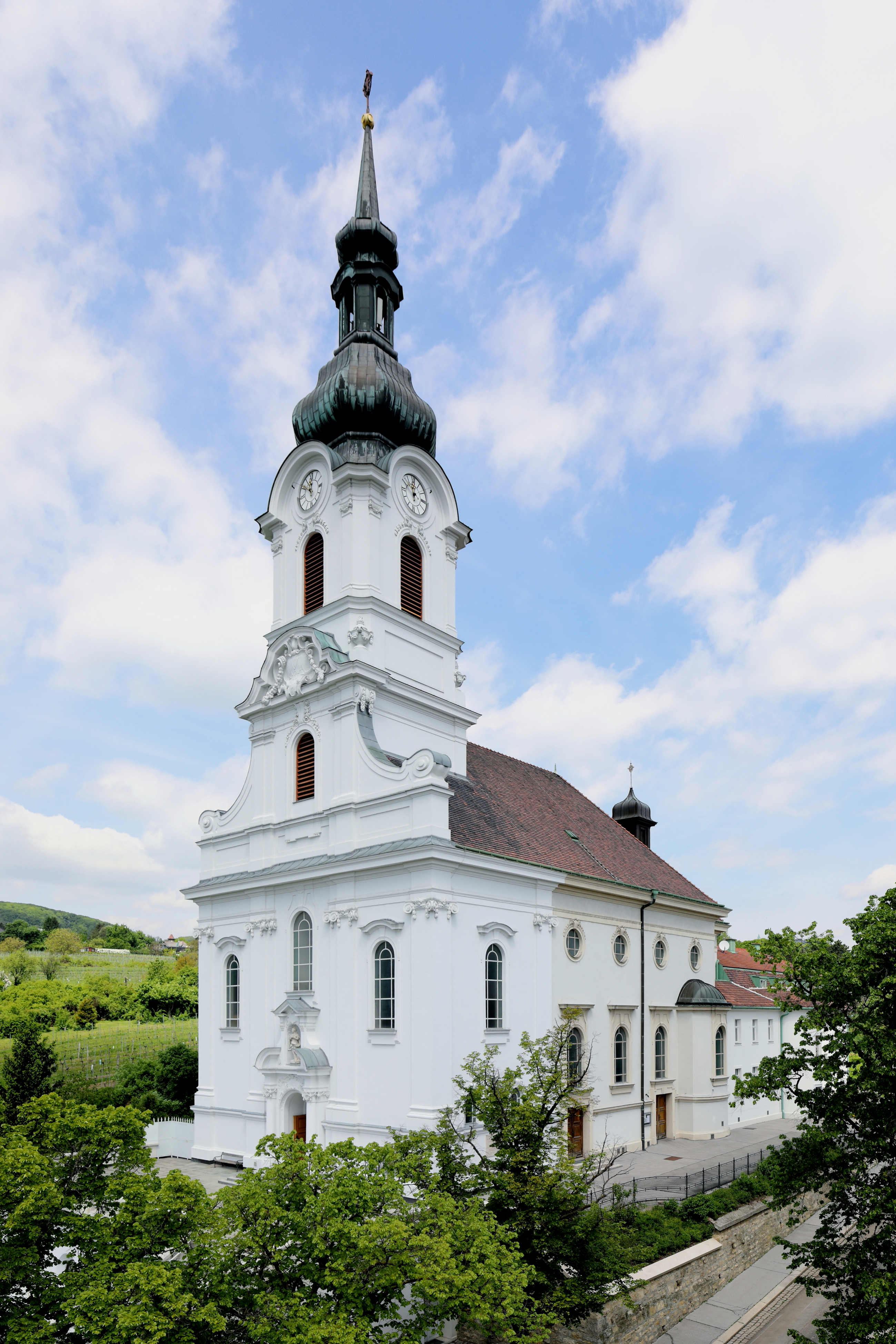 Südansicht der Filial- und Wallfahrtskirche „Mariä Schmerzen“ in Grinzing, ein Bezirksteil des 19. Wiener Gemeindebezirkes Döbling.Die neobarocke Kirche wurde ab 1909 anstelle einer Kapelle von den Architekten Gustav Orglmeister (Planung) und Franz Kupka (Entwurf und Ausführung) erbaut und am 30. April 1910 geweiht. Hinter der Kirche ist das Ordenshaus der Kongregation der Oblaten des heiligen Franz von Sales angebaut.